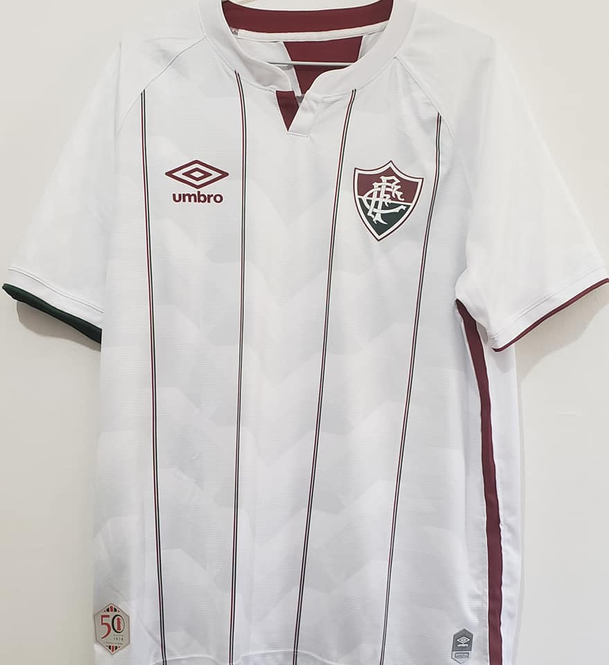 Camisa número 2 do Fluminense Football Club (Rio de Janeiro, Brasil) em 2020 fabricada pela Umbro. Os modelos 2020, lançados oficialmente em 6 de maio de 2020 através de Live na FluTV com o rapper Xamã, trazem um selo em homenagem aos 50 anos da conquista do Campeonato Brasileiro de 1970, o primeiro campeonato nacional conquistado pelo Fluminense.